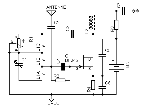 Transistoraudion mit JFET in Schnell-Schaltung